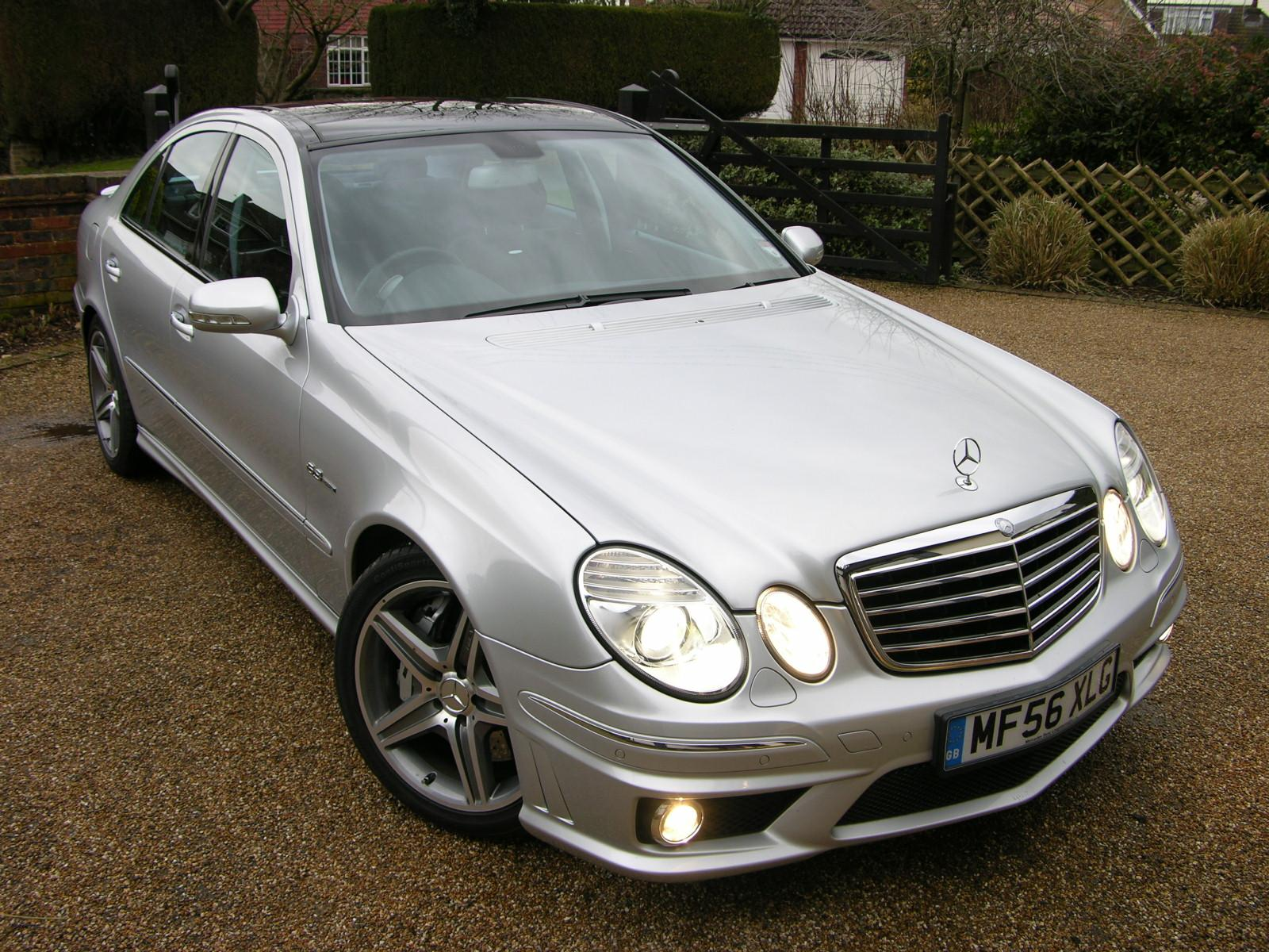 2006 Mercedes Benz E63 AMG